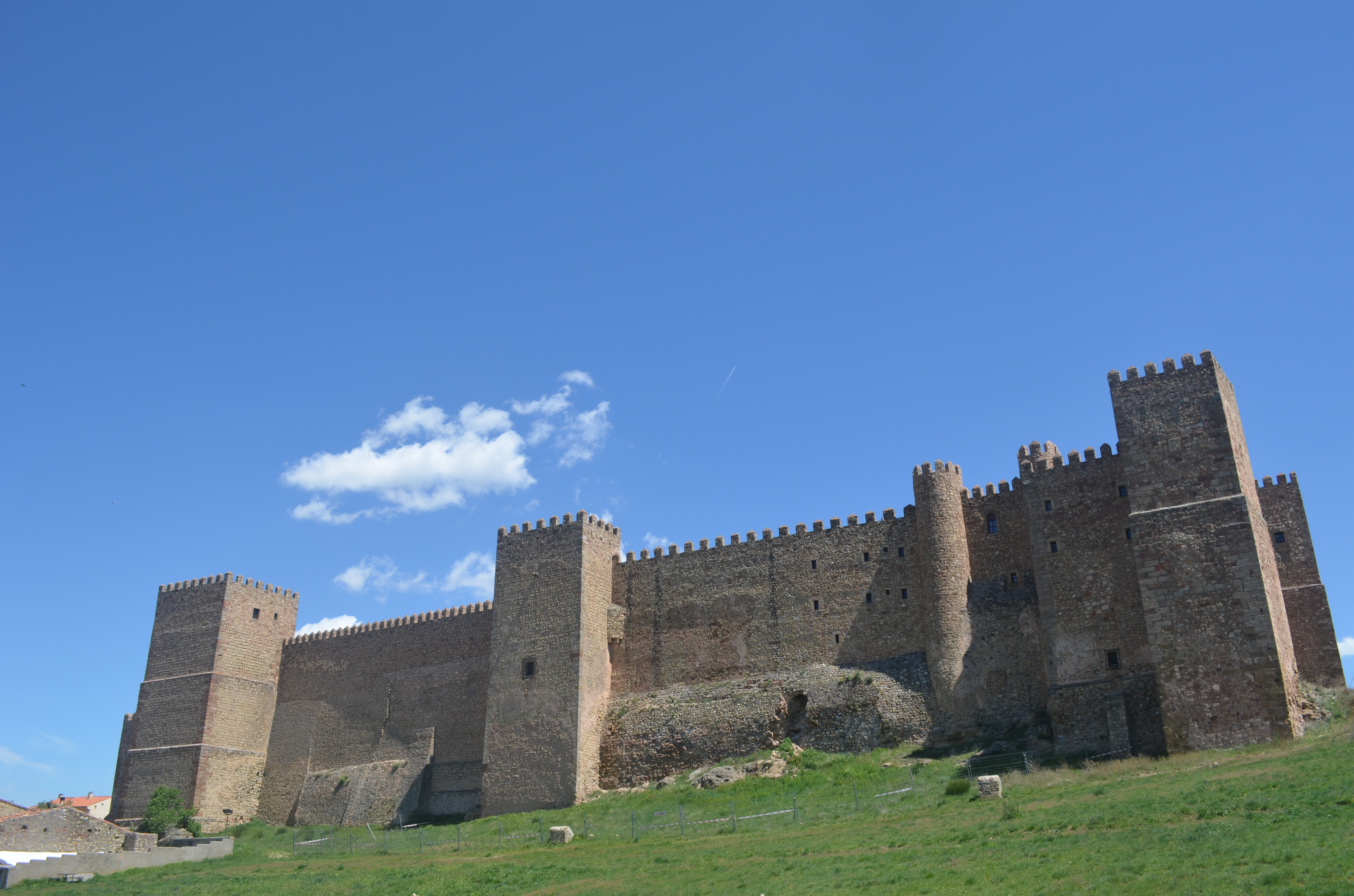 Castillo de los Obispos de Sigüenza